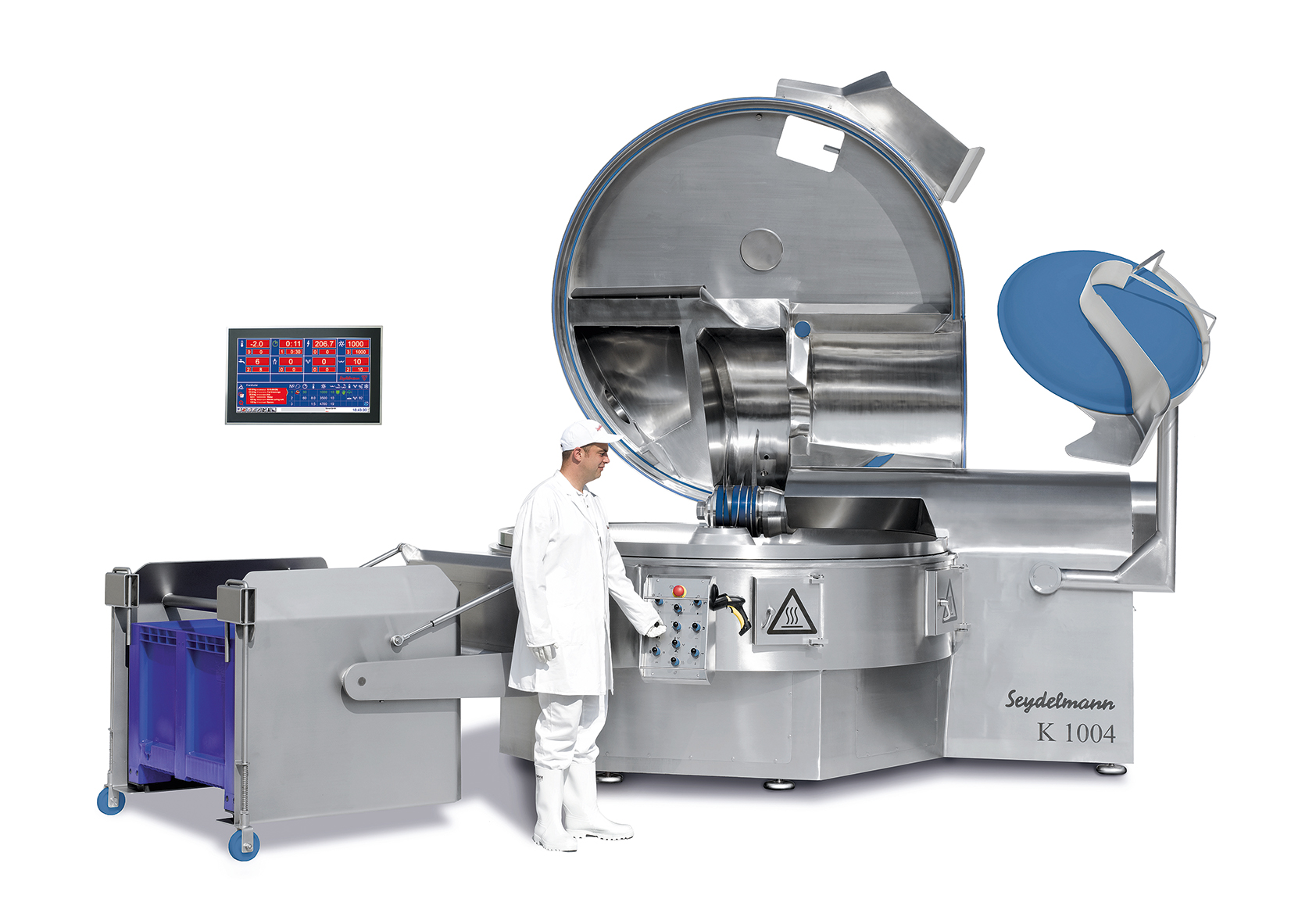 Seydelmann Kutter K 1004 mit Auto Command Touch